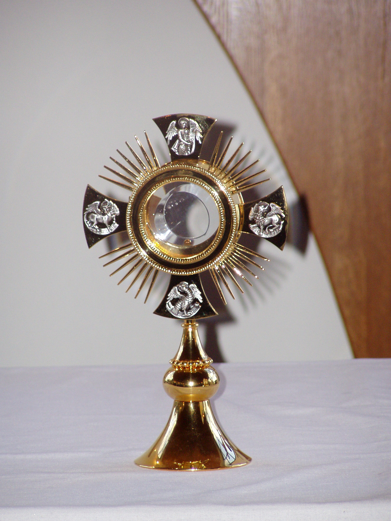 Monstrance, používaná v kapli sv. Zdislavy ve Slavkově, okr. Uherské Hradiště